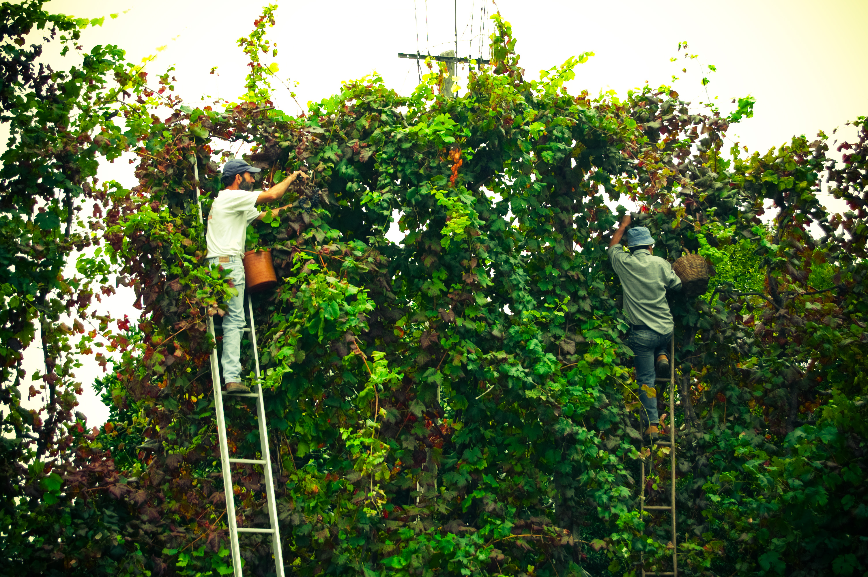 Vindima em Guimarães,Portugal